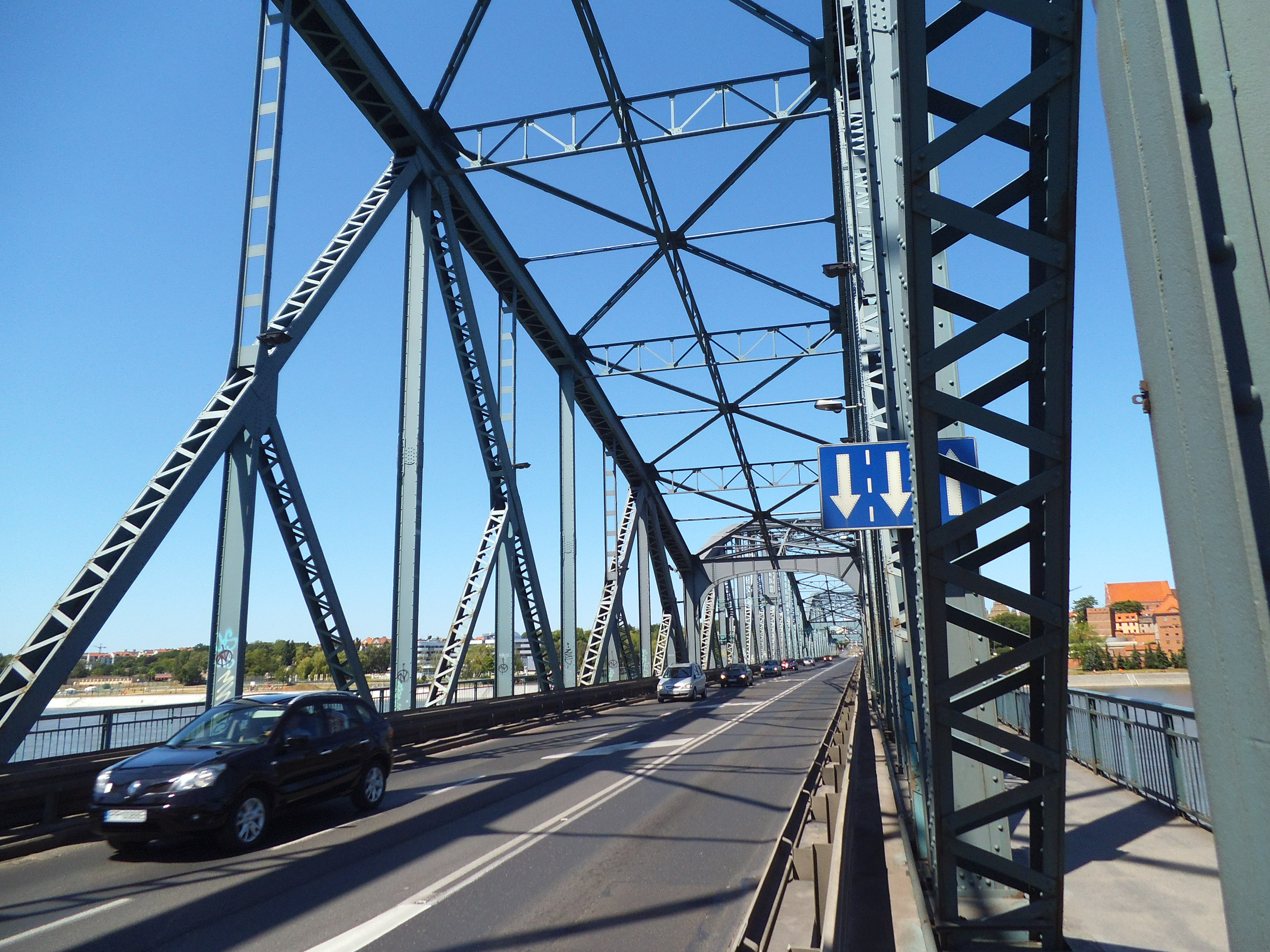 Most drogowy im. Józefa Piłsudskiego w Toruniu1